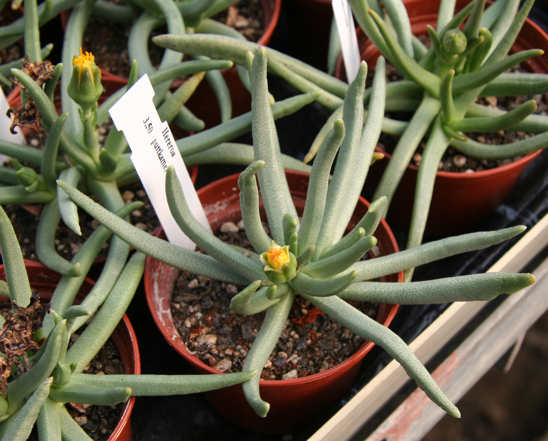 Hereroa puttkameriana in Kultur bei Kakteen-Haage in Erfurt